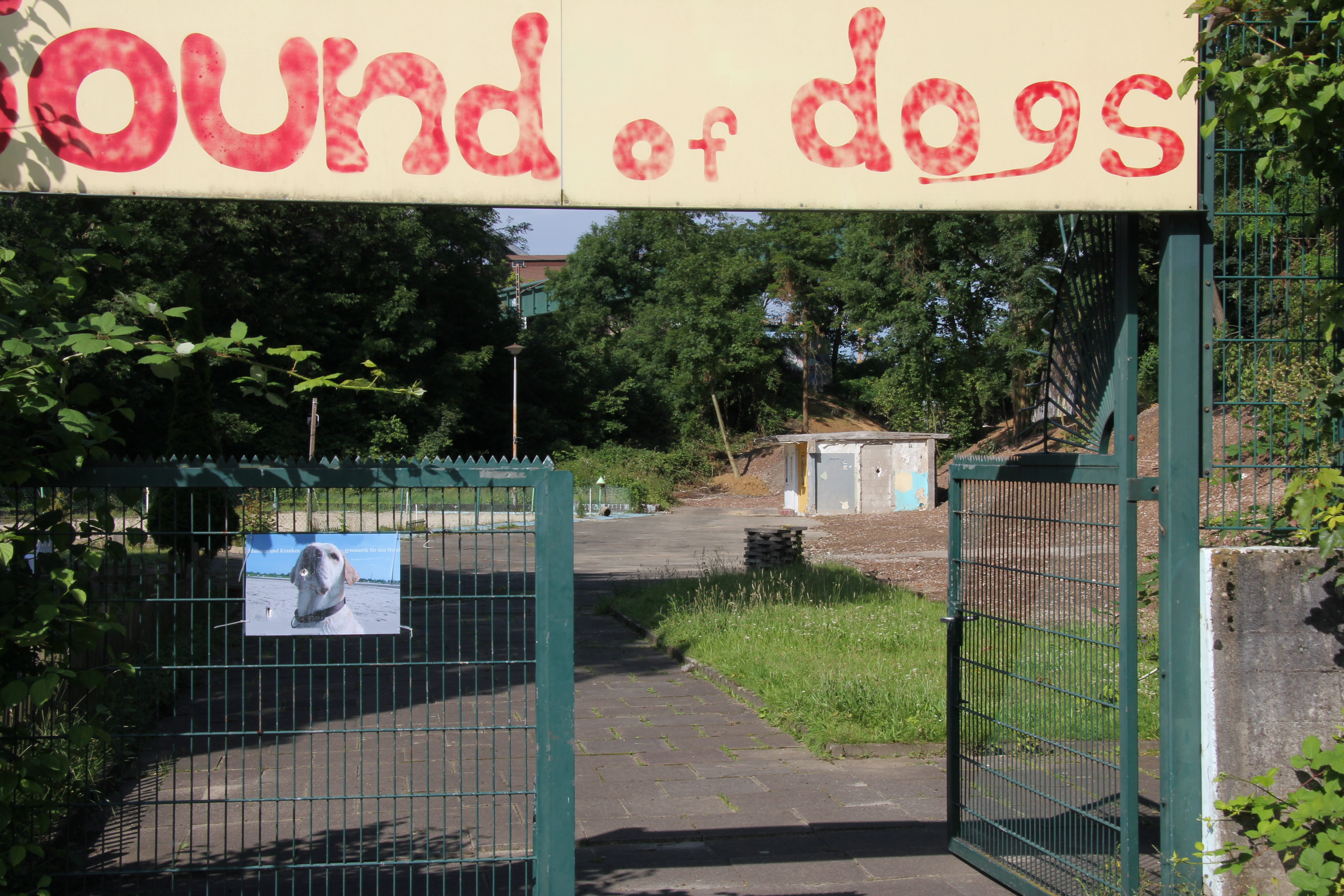 Ehemaliges Freibad Schallacker in Dortmund-Hörde. Zur Zeit (2012) als Hundeschule genutzt.